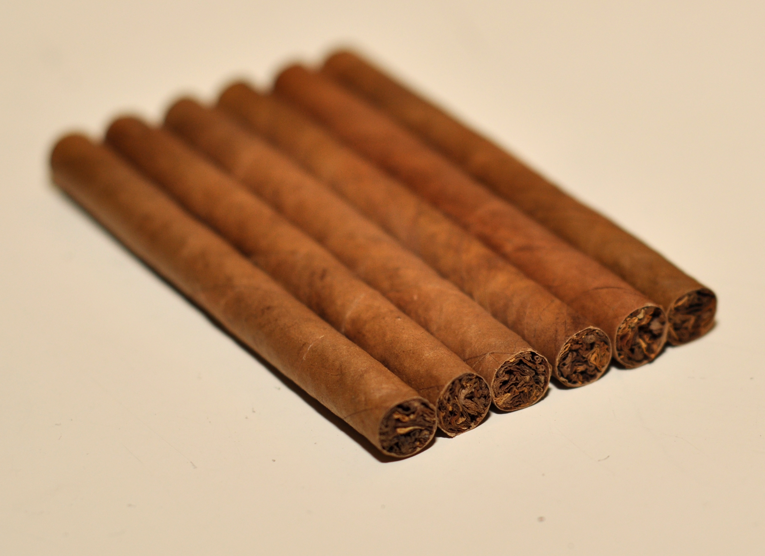 Fem cigarillos på stribe